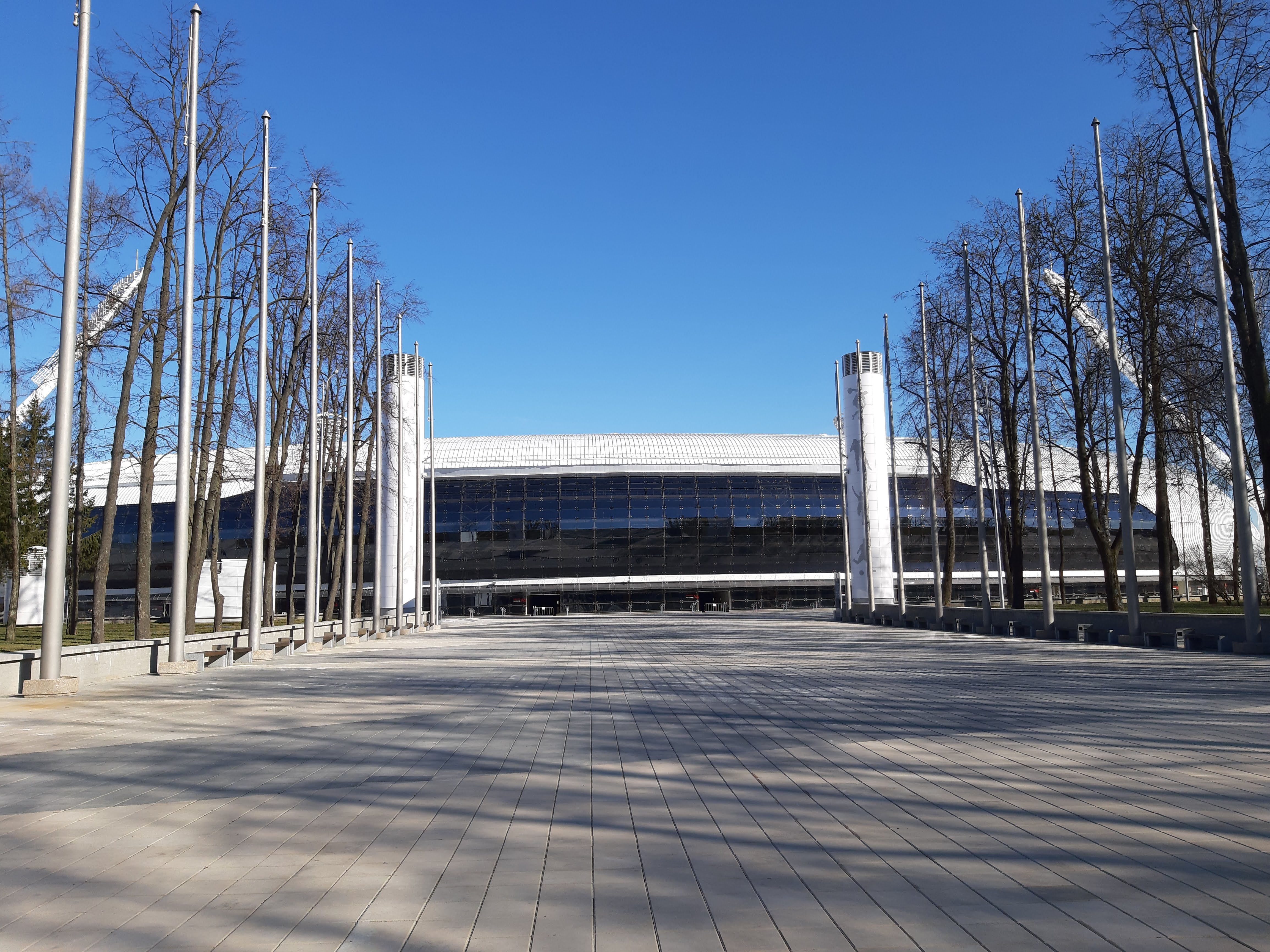 Мінск. Кірава ў сакавіку 2019